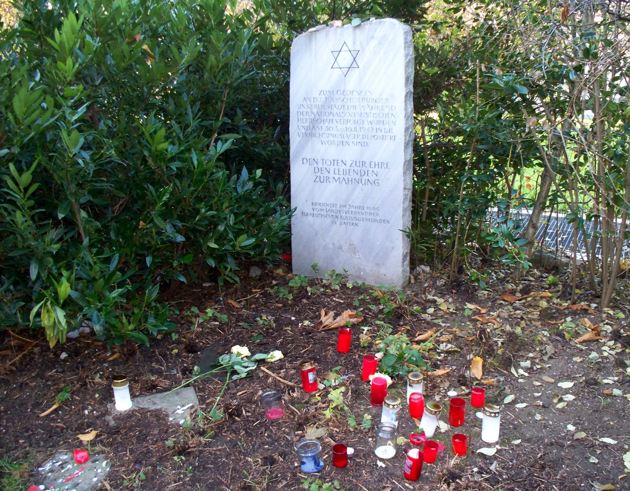 Denkmal für die ermordeten Juden in der Zeit des Nationalsozialismus in Kempten, Bayern.